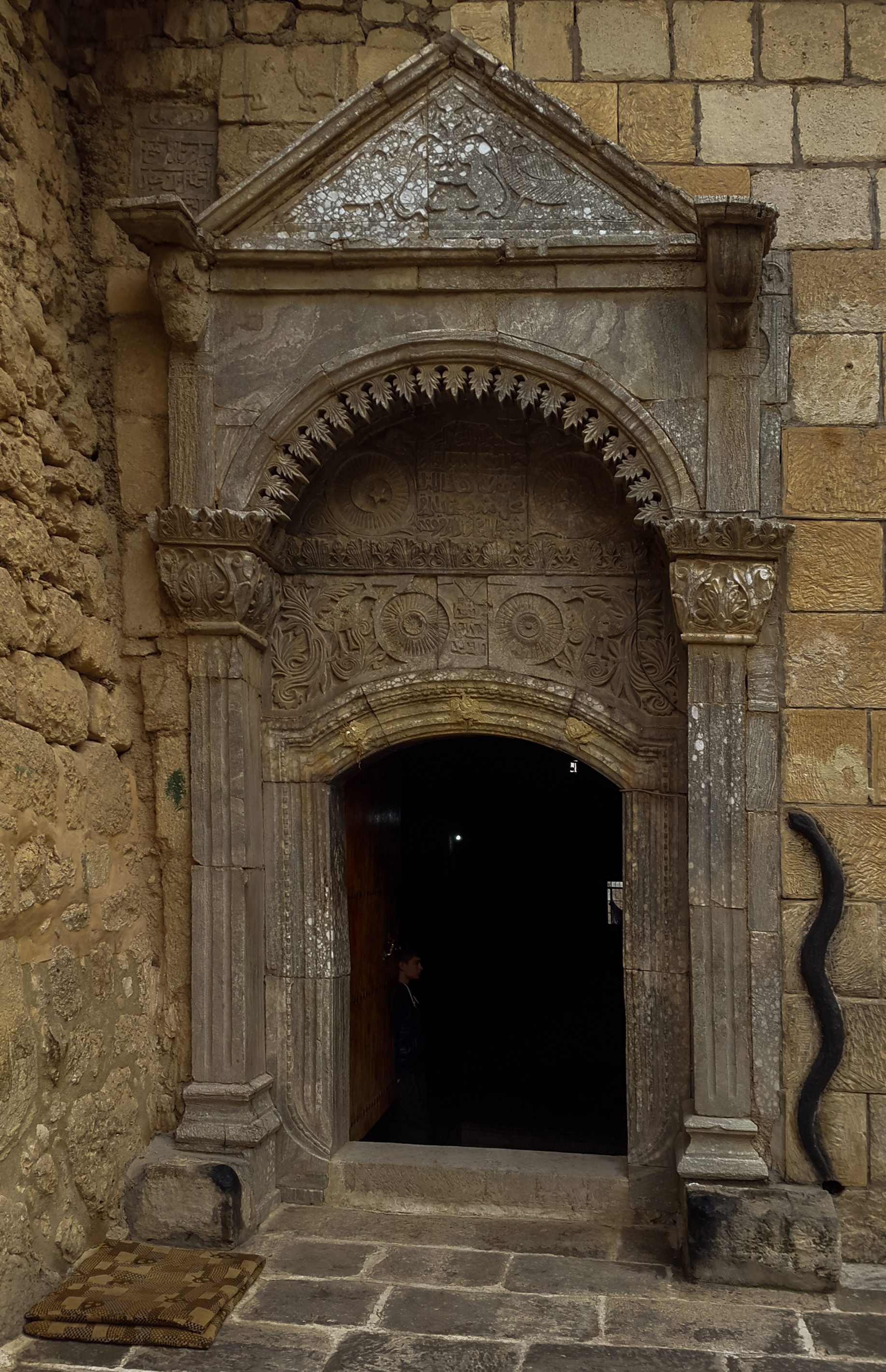 L'ingresso del tempio sacro di Lalish